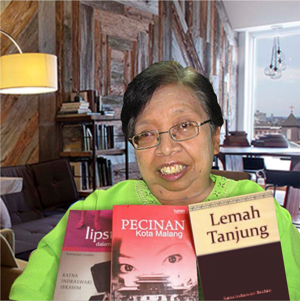 Ratna Indraswari Ibrahim, sastrawan, penulis